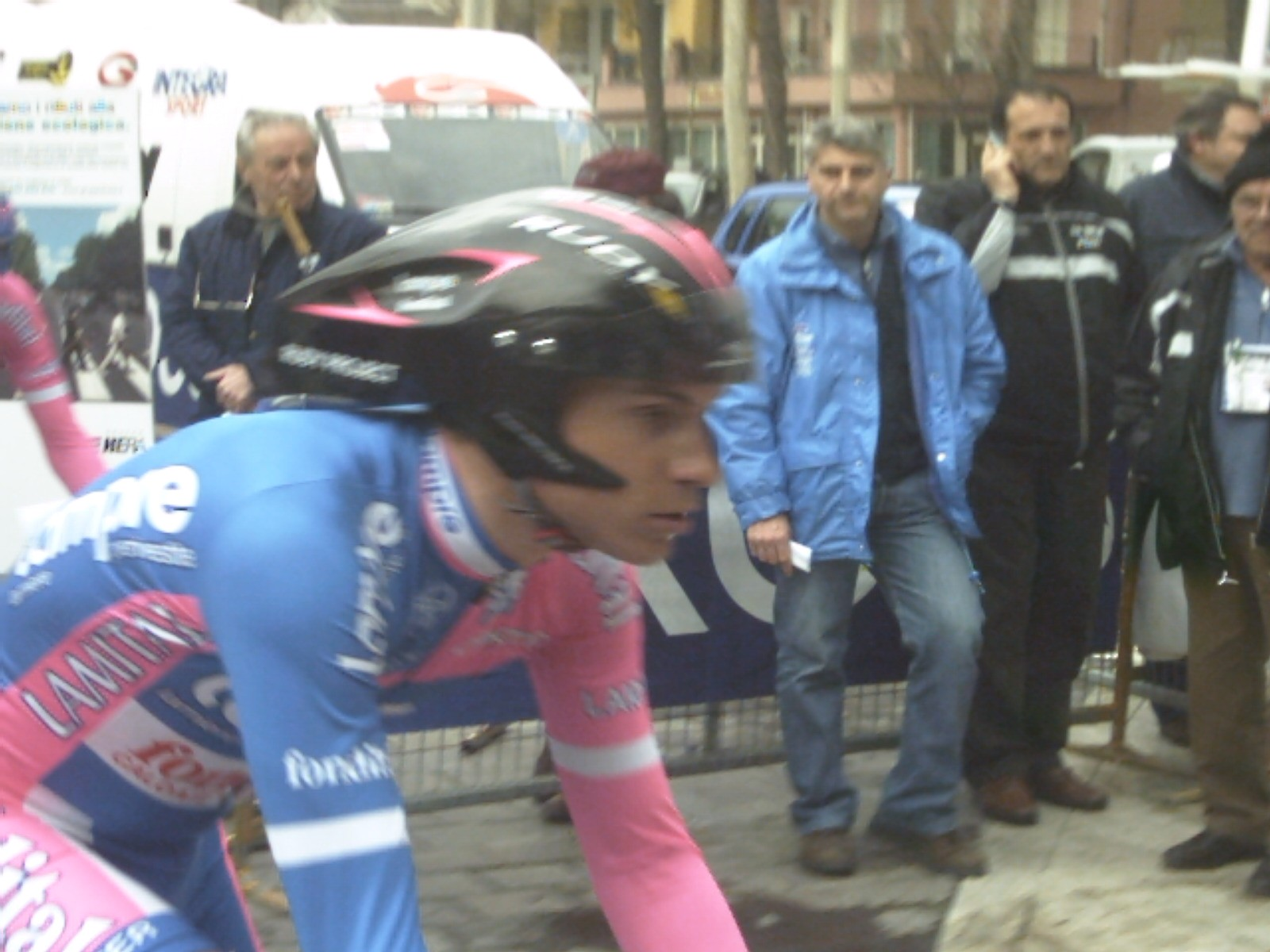 Damiano Cunego nella cronosquadre Misano-Misano